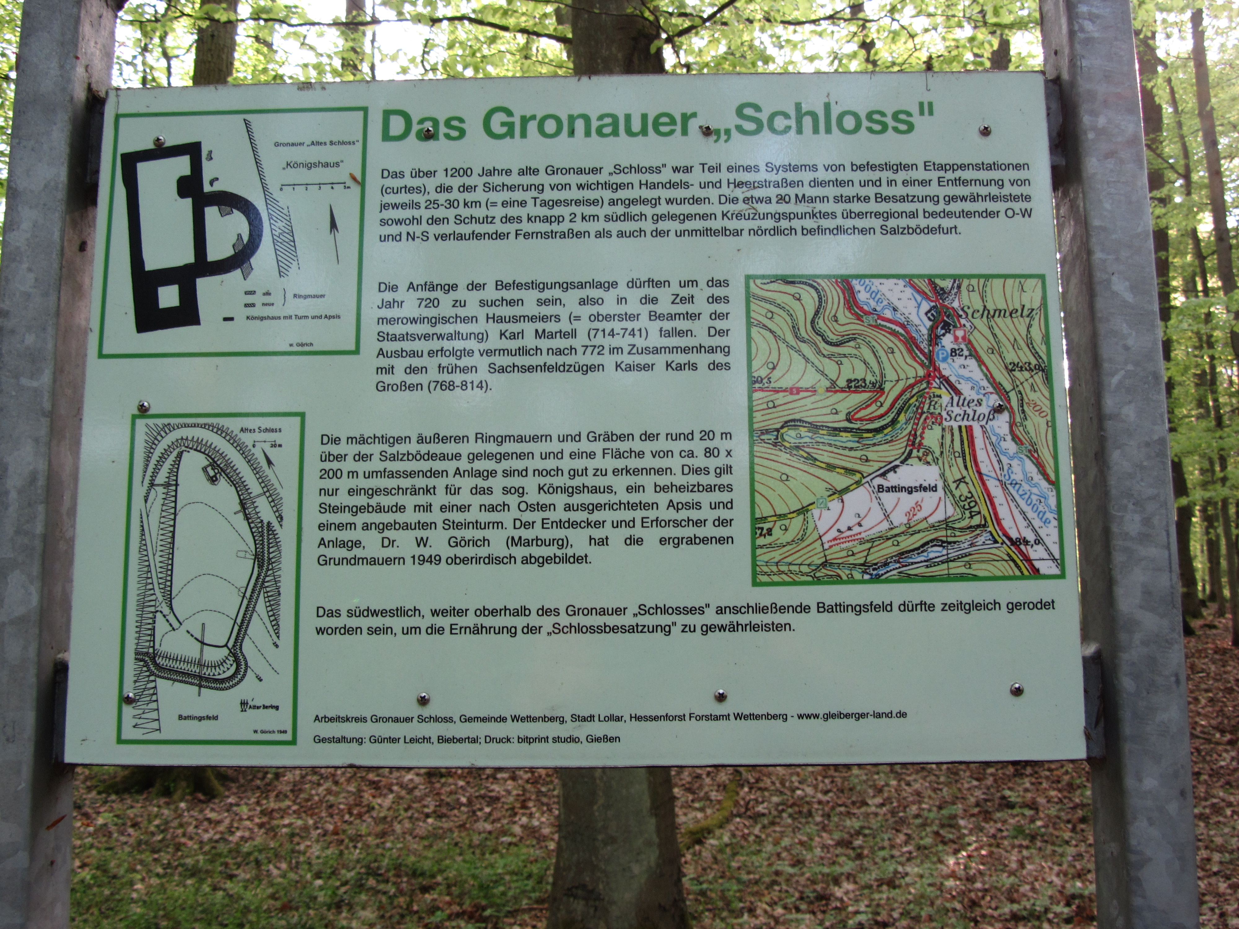 Hinweistafel mit Grundriss